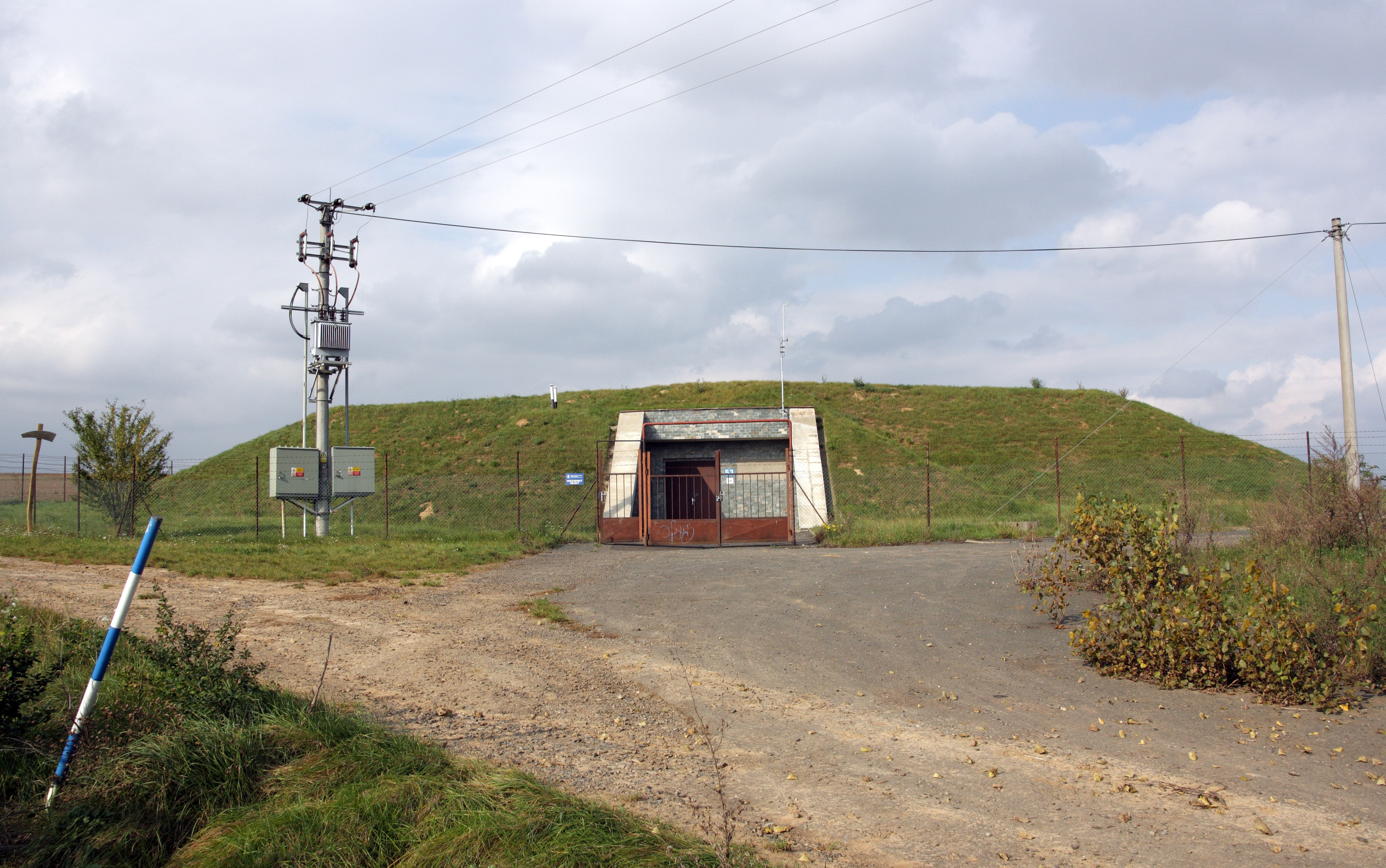 Želešice - vodojem Rajhrad II Vírského oblastního vodovodu.